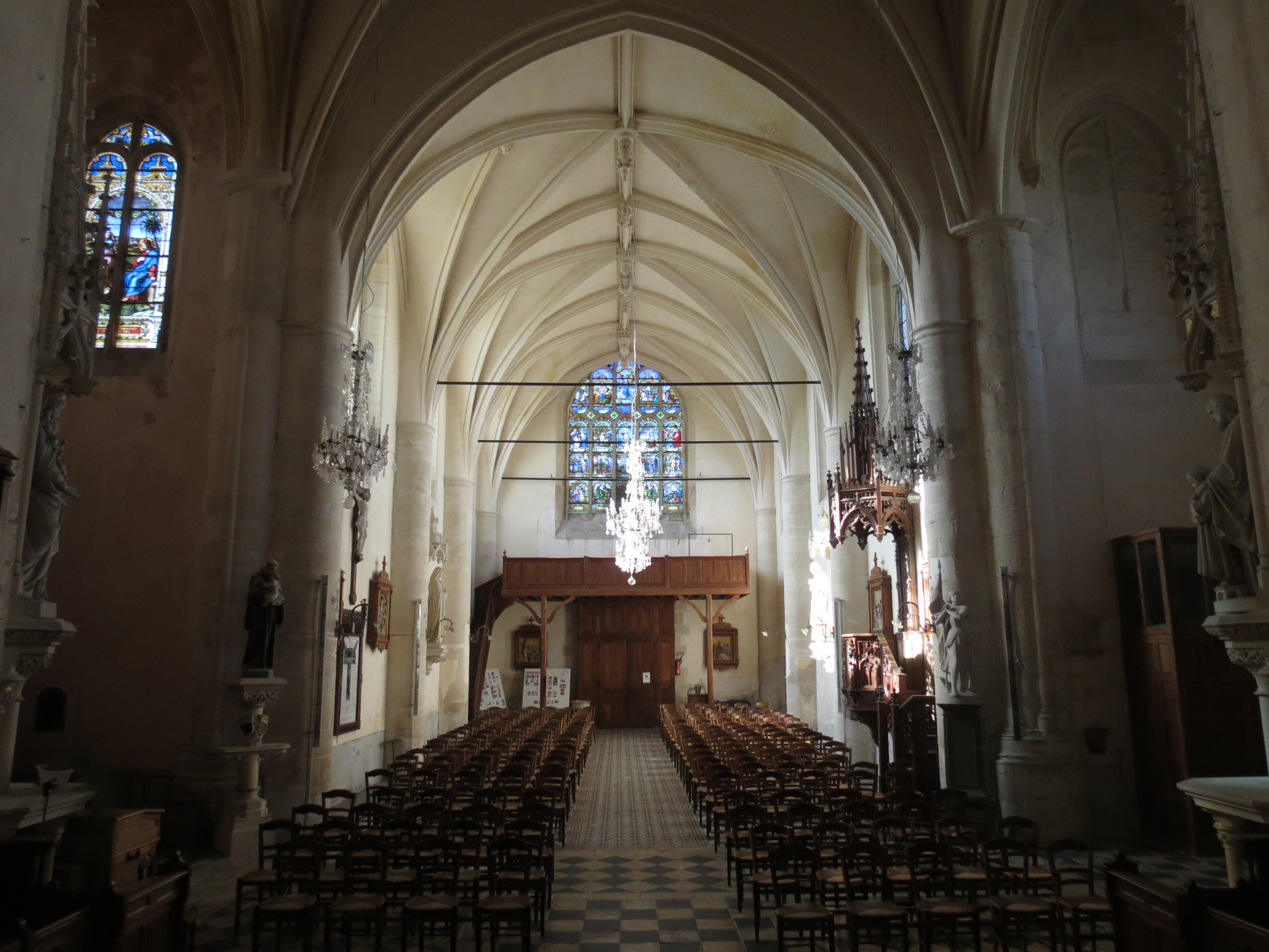 Intérieur de l'Abbaye d'Almenêches, vue de la nef